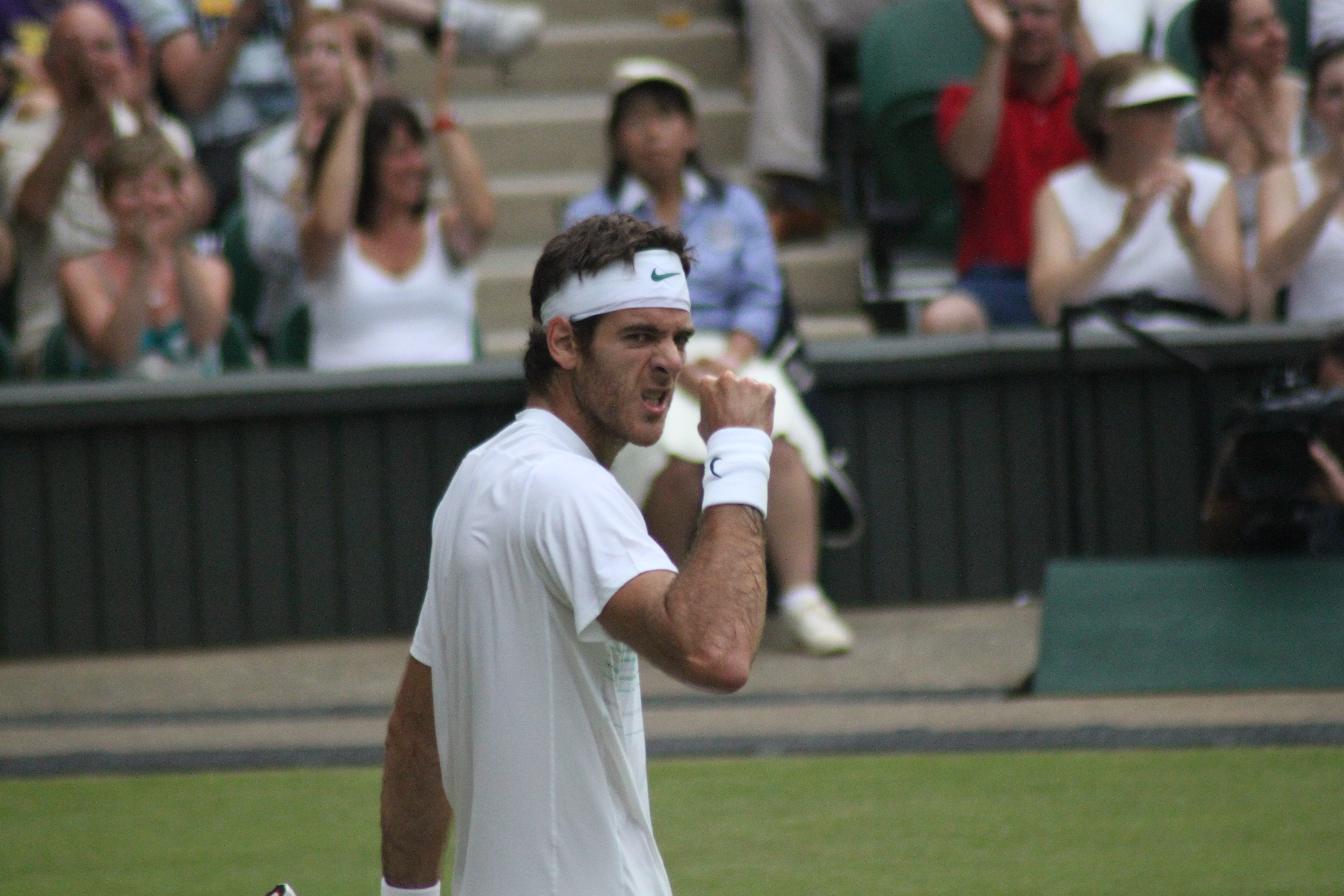 Del Potro celebrates